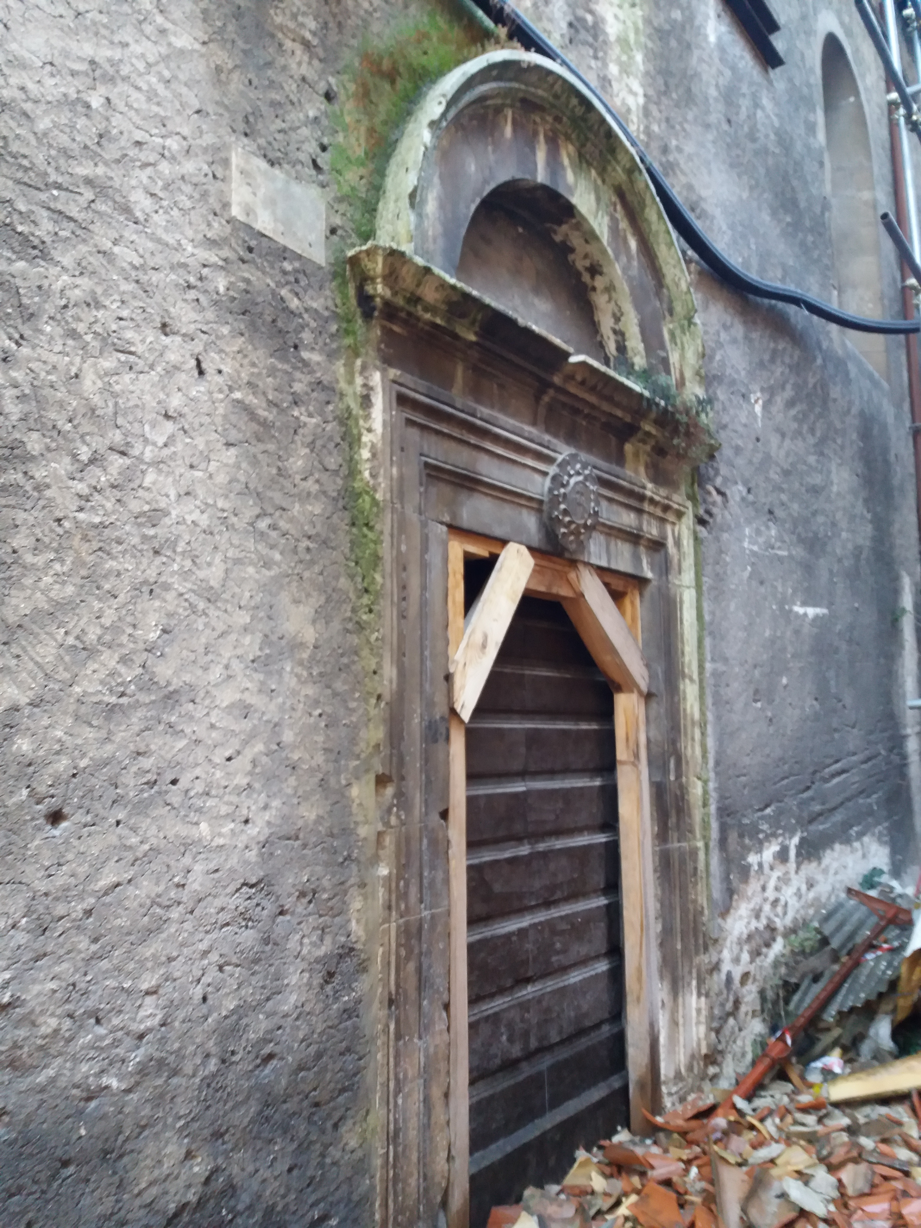 L'Aquila: Chiesa della Beata Antonia